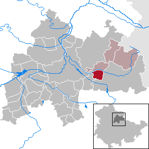 Kleinneuhausen in Thuringia - District Sömmerda